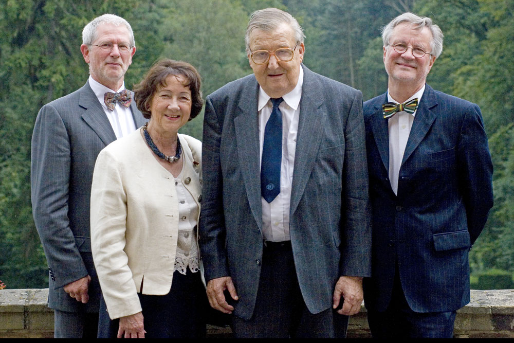 Foto auf der Terrasse von Schloss Birlinghoven: (v. l.) Prof. Dr. Thomas Christaller (Fraunhofer IAIS), Marika Roitzheim (Erste Vertreterin des Bürgermeisters von Sankt Augustin), Prof. Dr. Carl Adam Petri und Prof. Dr. Ulrich Trottenberg (Fraunhofer SCAI)